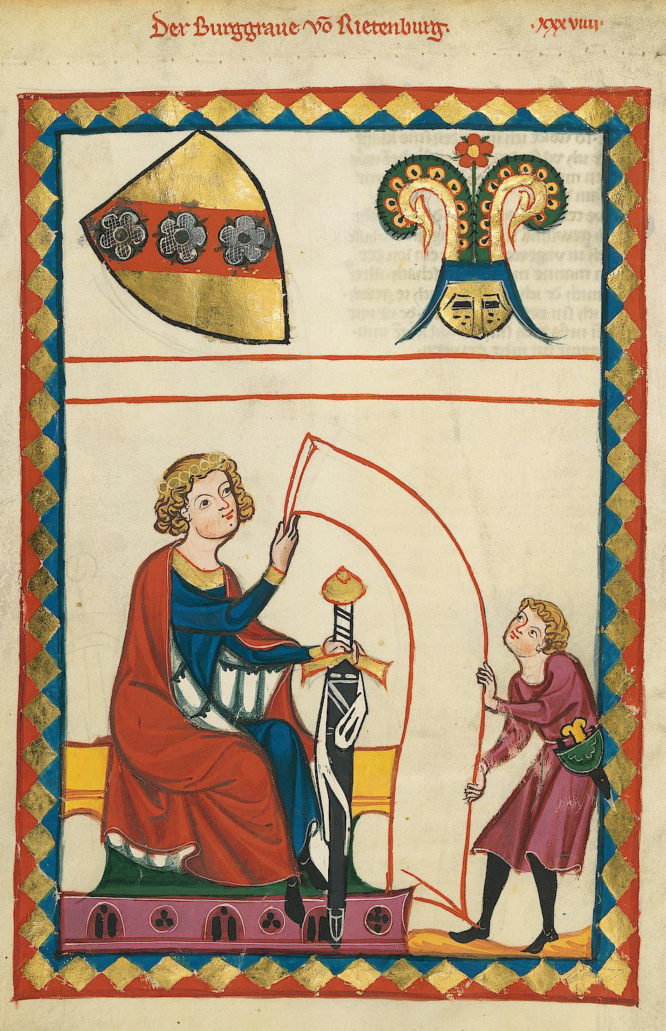 Codex Manesse, UB Heidelberg, Cod. Pal. germ. 848, fol. 119v. Burggraf von Ritenburg (Riedenburg)